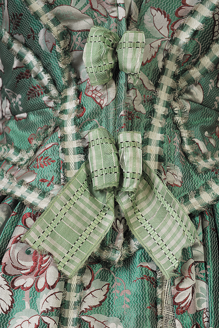 Dvoudílné hedvábné šaty, detail, Uměleckoprůmyslové muzeum v Praze